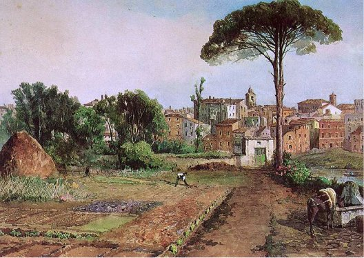 Prati di Castello in Rome (rione Prati)